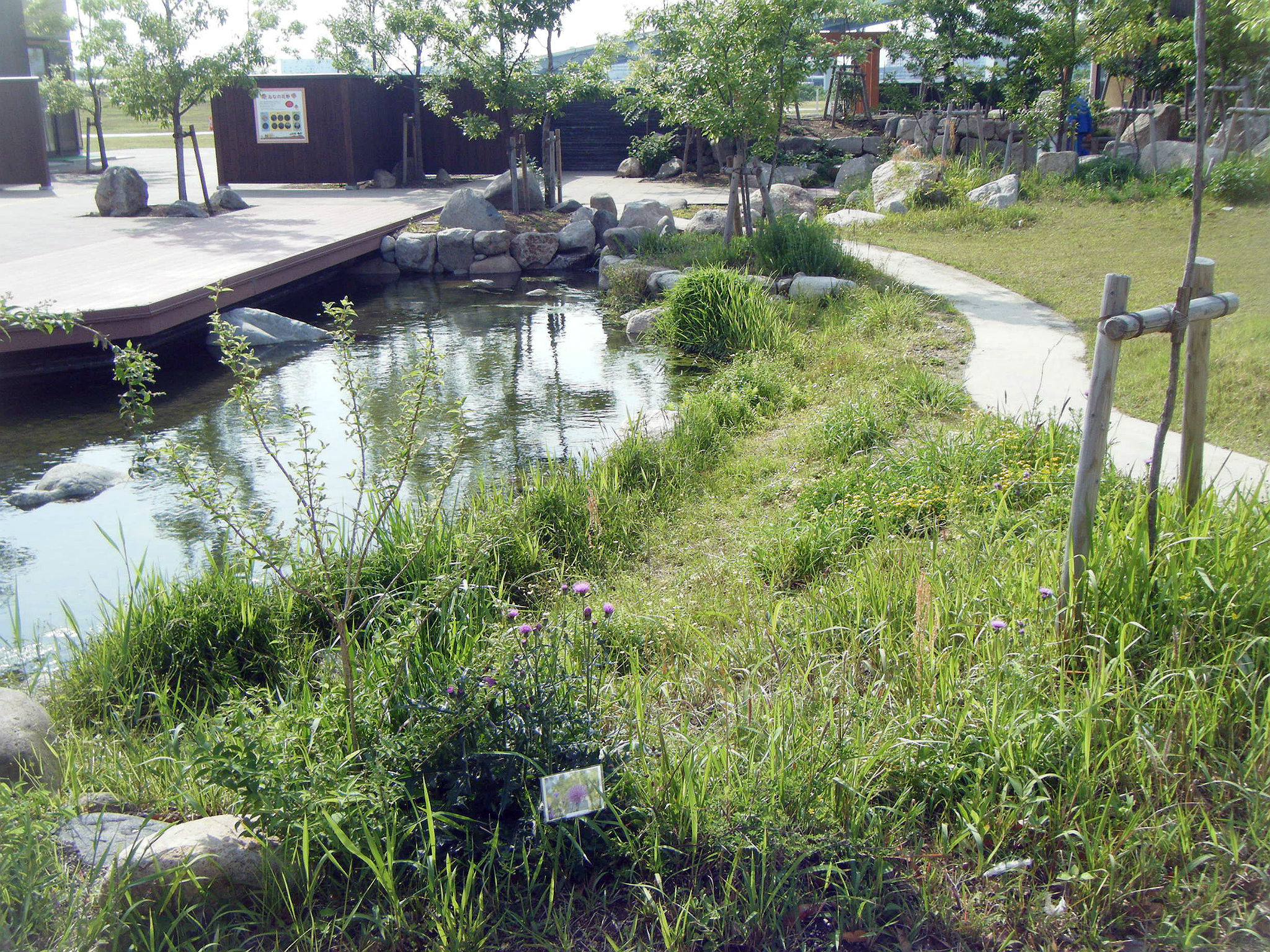 尼崎の森中央緑地 ゐなの花野